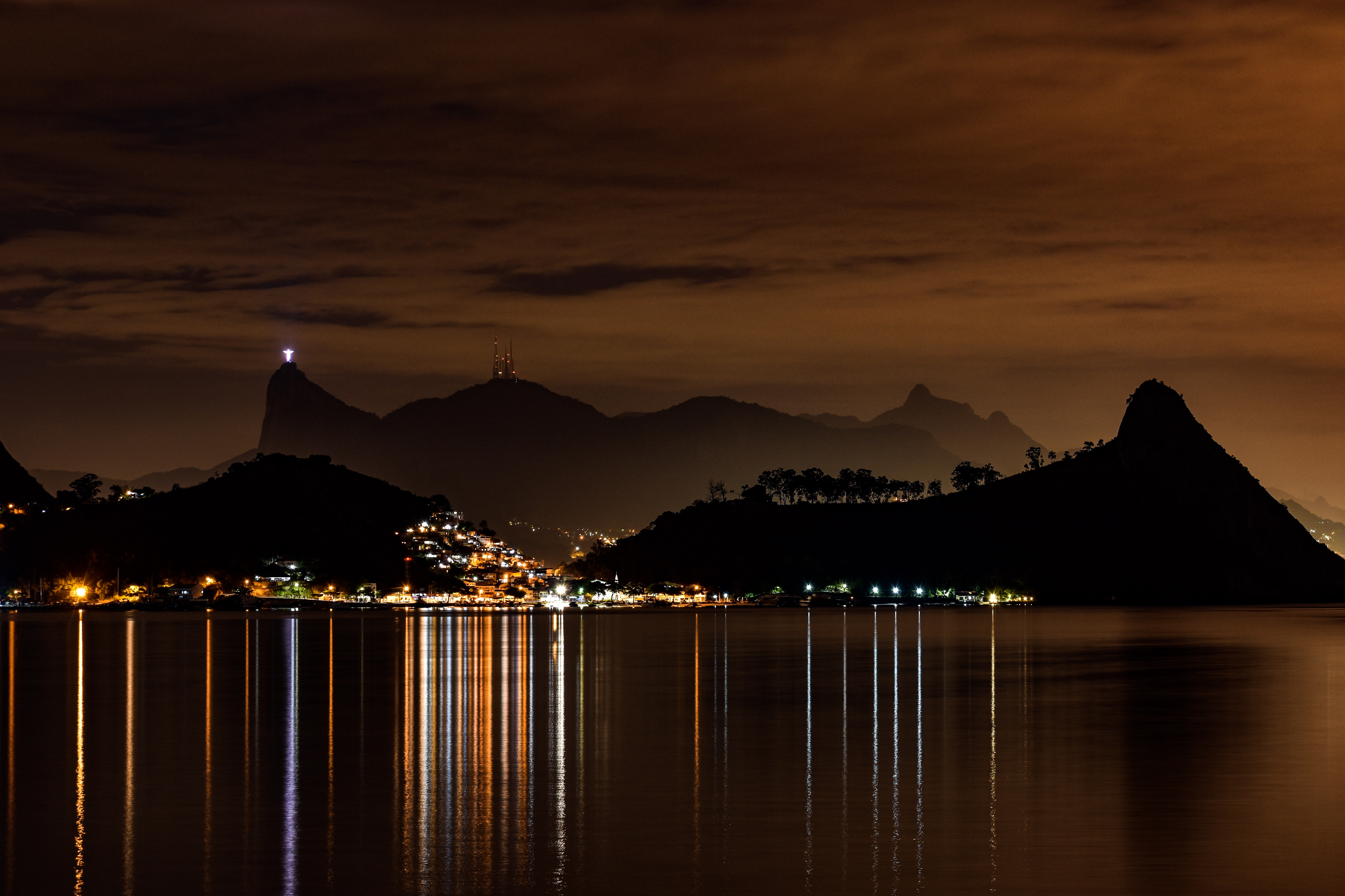 Cristo Redentor visto da Praia de São Francisco